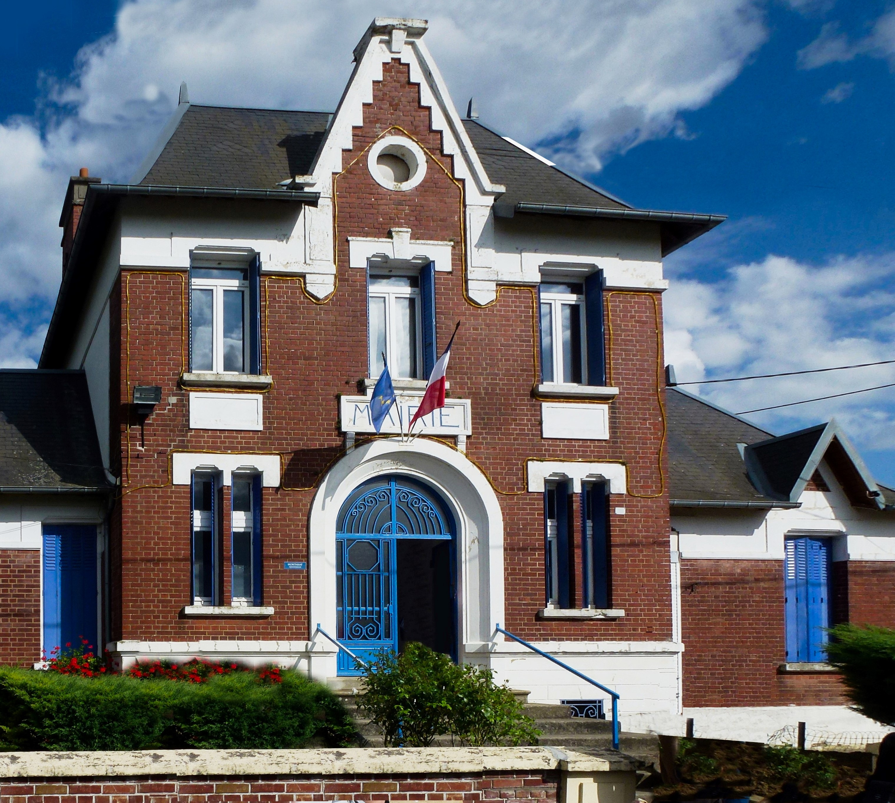 Mairie, 18 rue Principale, Croix-Fonsomme.- Aisne.- France.